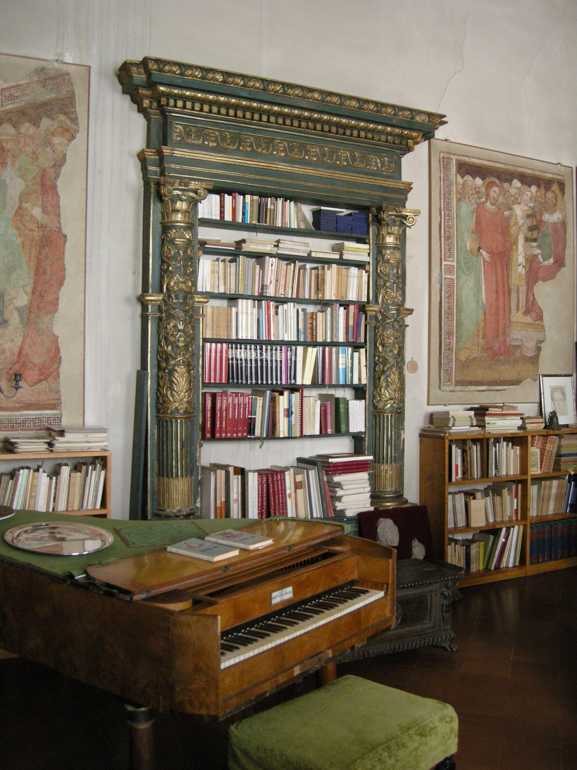 Palazzo bargellini, interno, sala 2